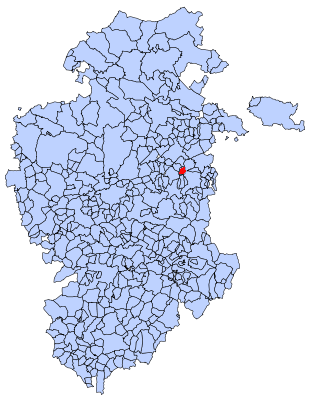 Cástil de Carrias en Burgos